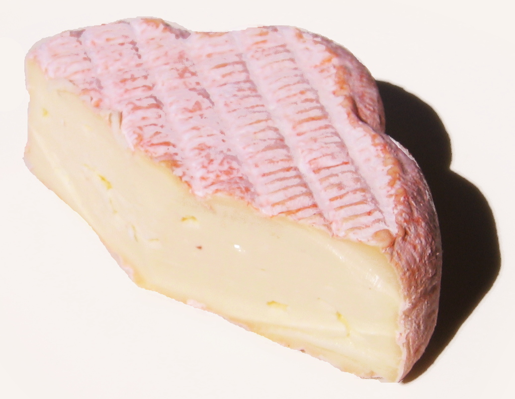 Saint-Albray GTIN 3222110024678